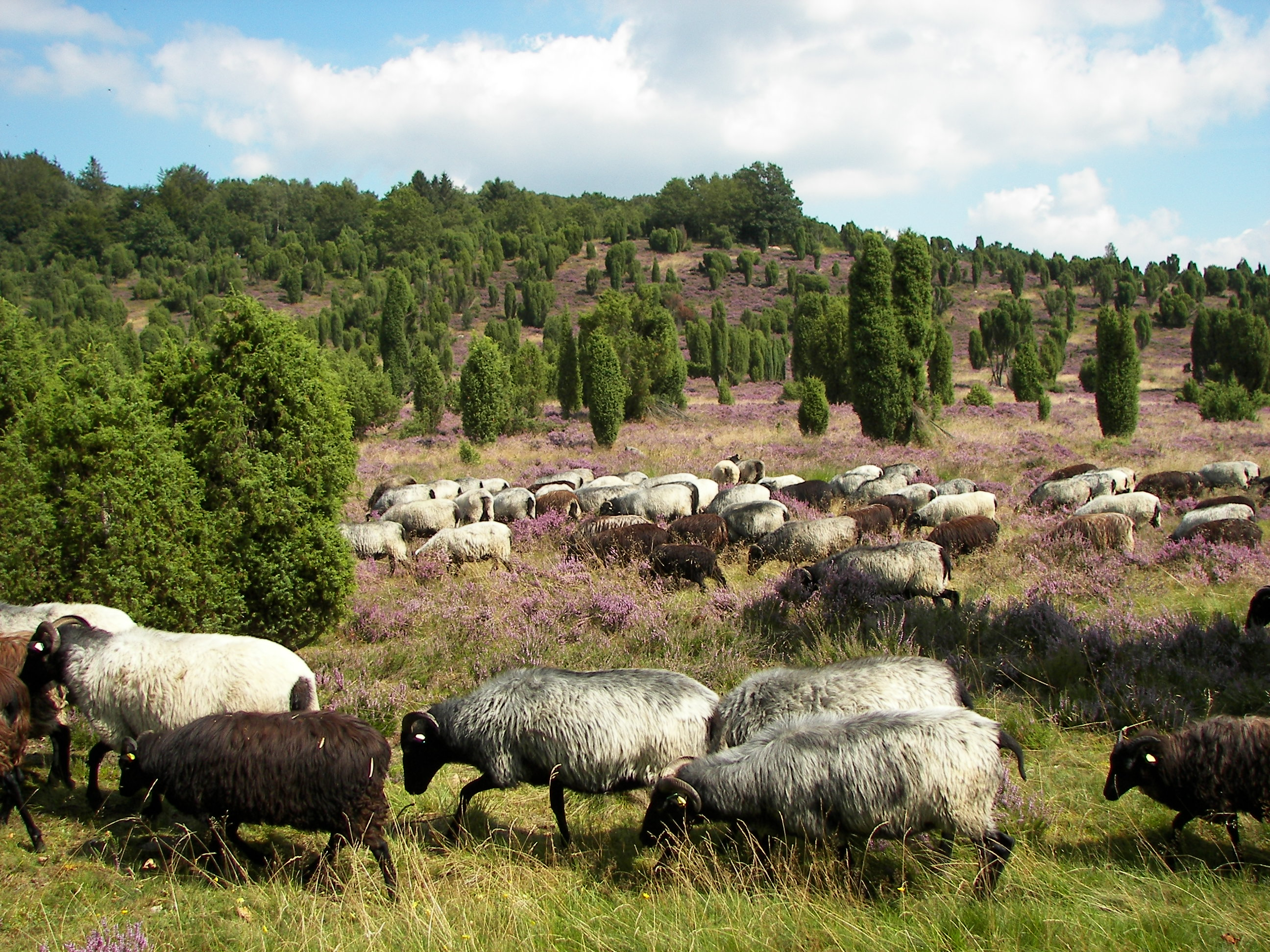 Heidschnucken im Steingrund, Lüneburger Heide